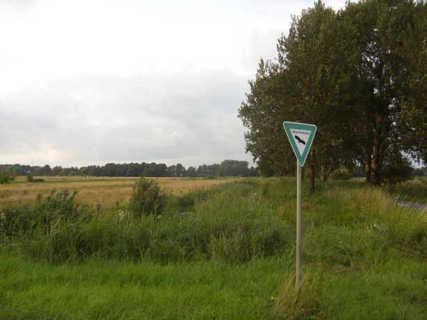 Naturschutzgebiet „Westliches Hollerland (Leherfeld)“